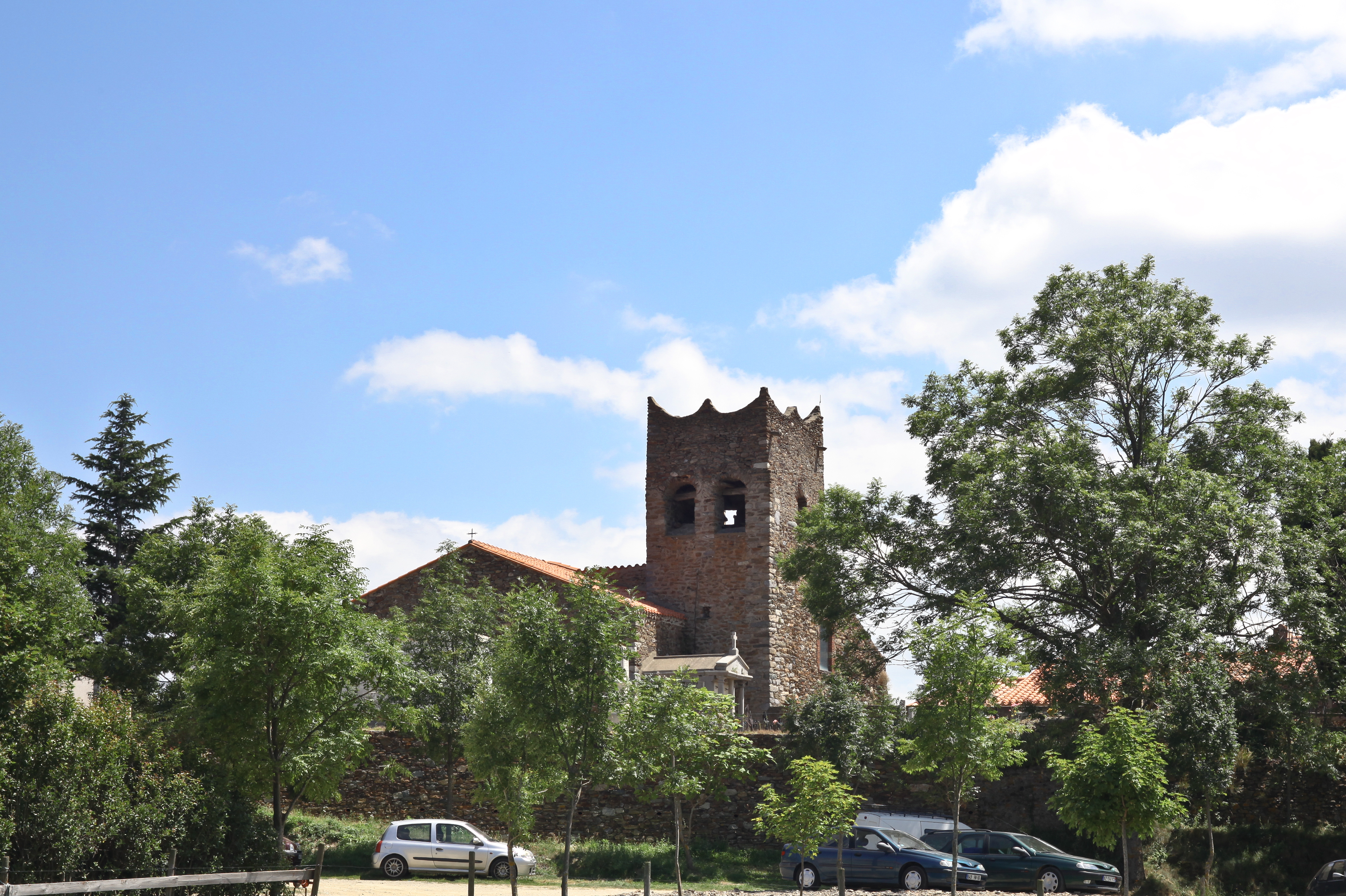 Village de La Bastide, l'église